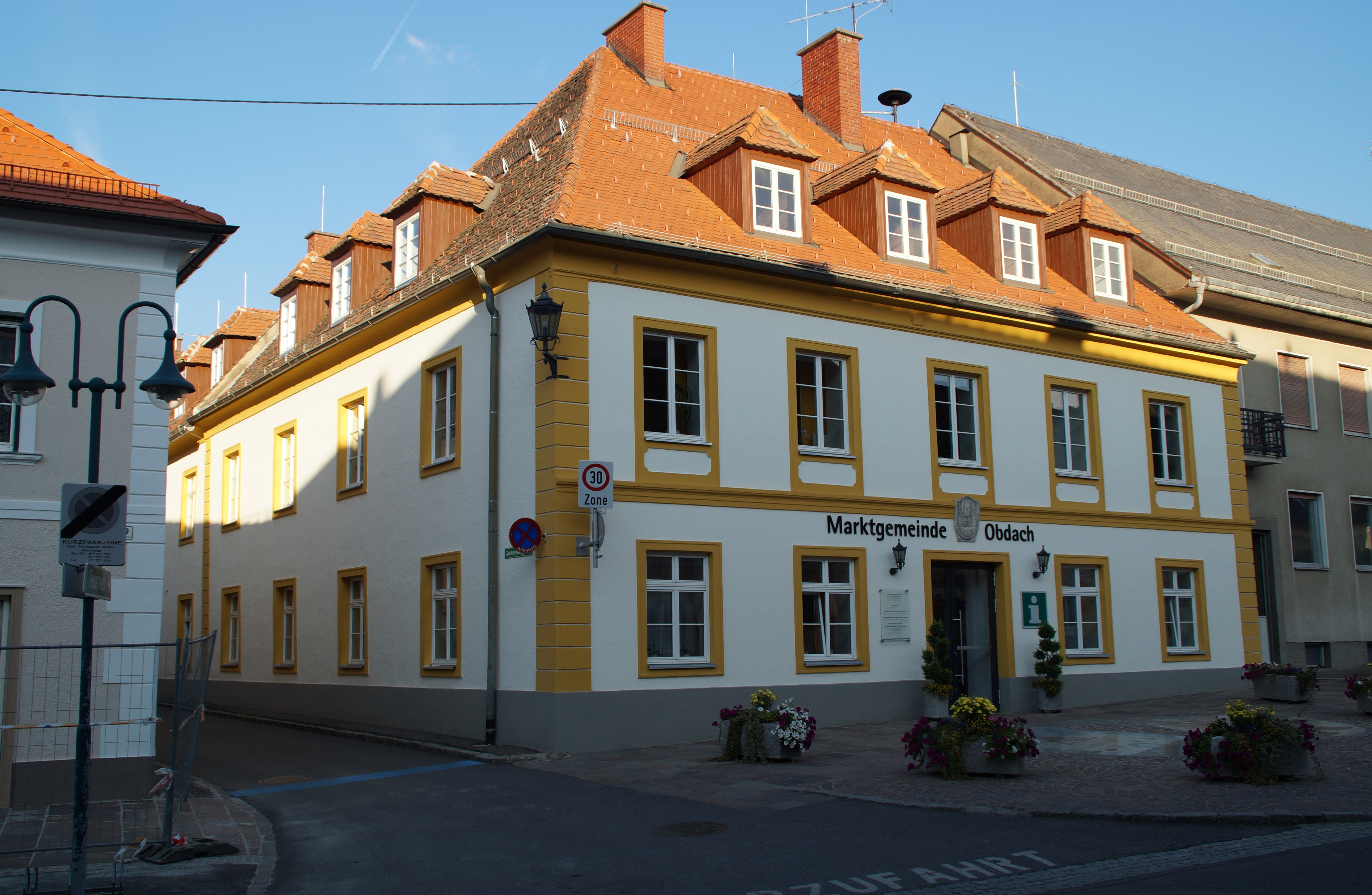 Gemeindeamt von Obdach, Bezirk Murtal